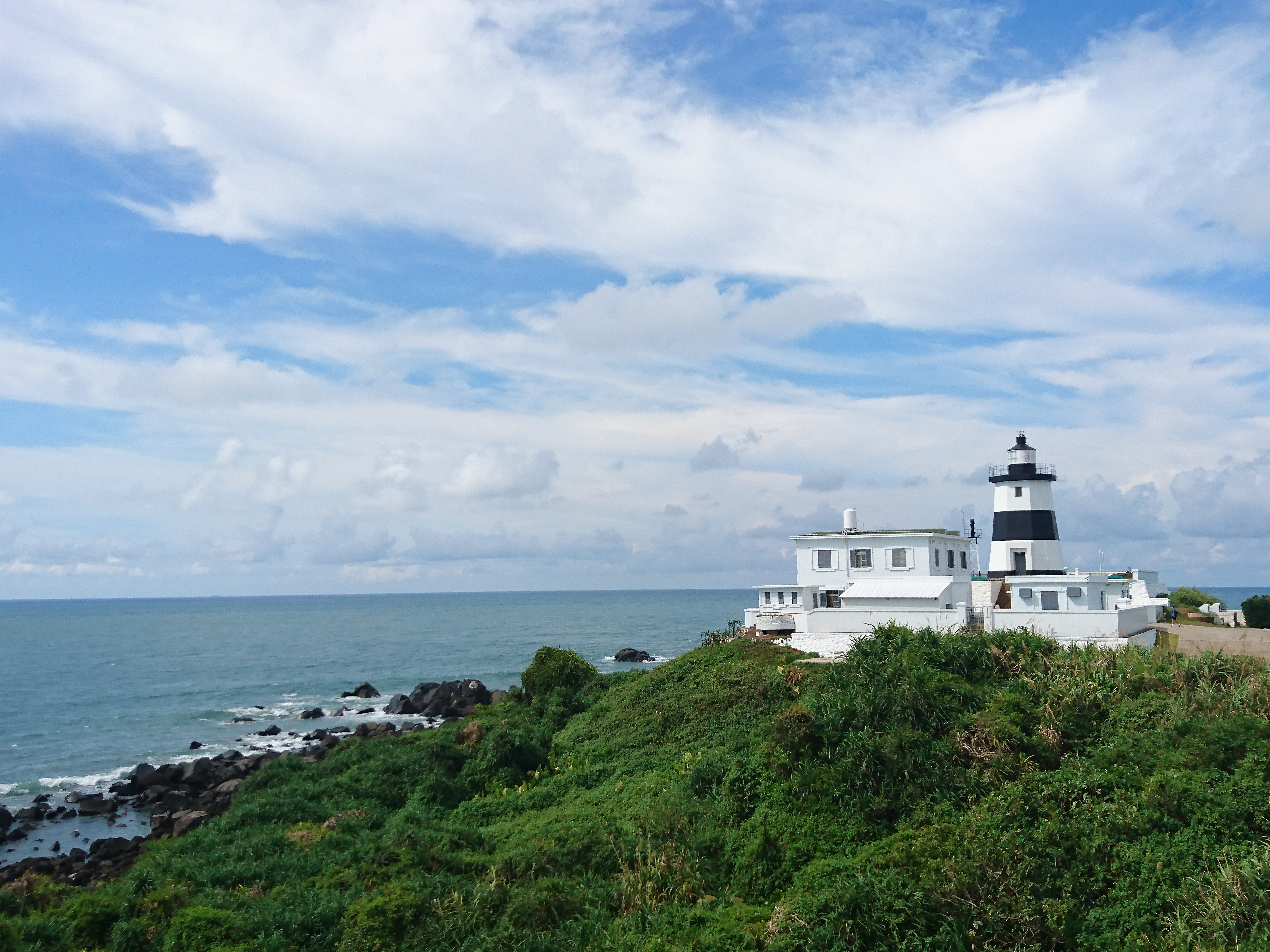 富貴角燈塔。